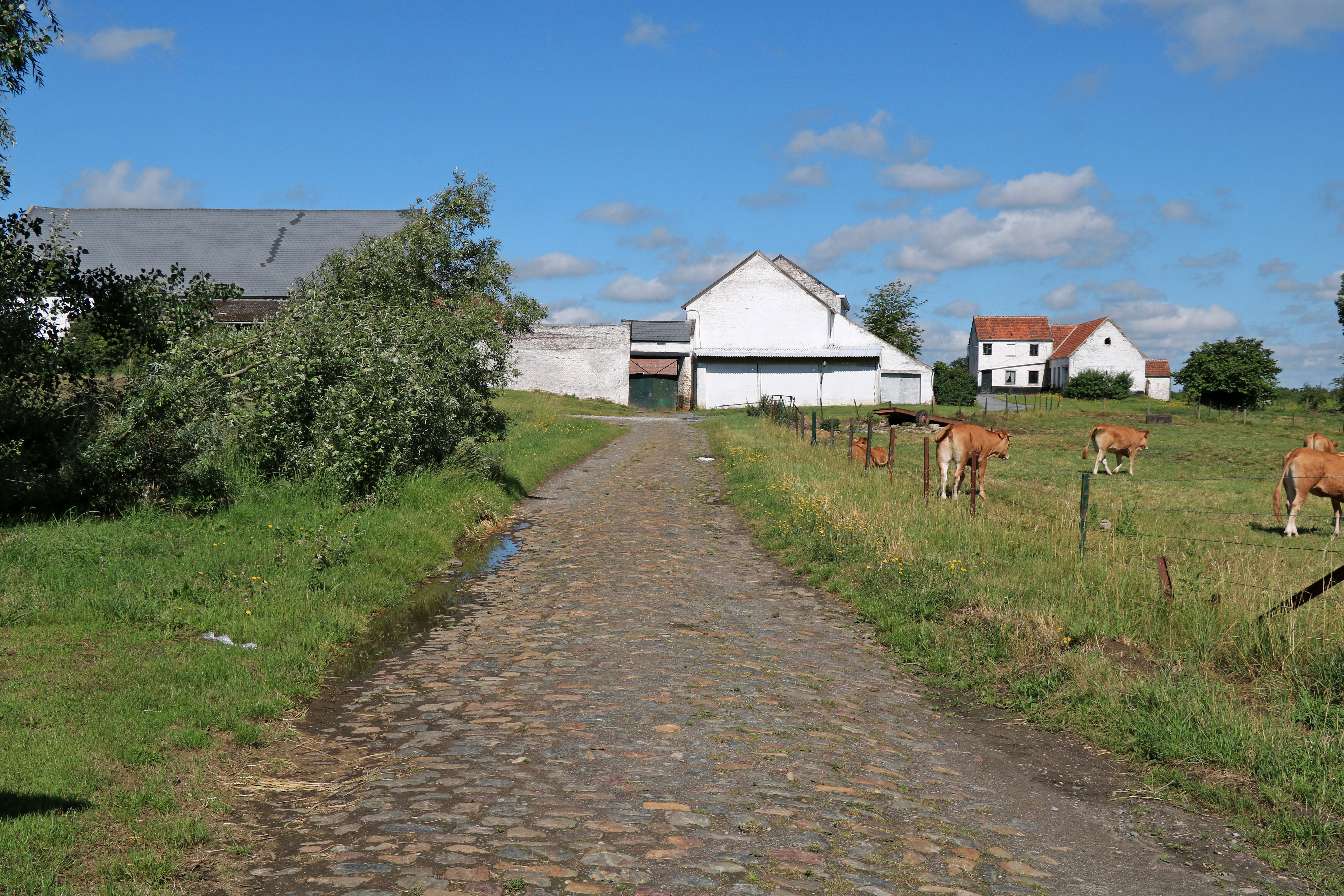 Belgique - Brabant wallon - Louvain-la-Neuve - Ferme de Lauzelle